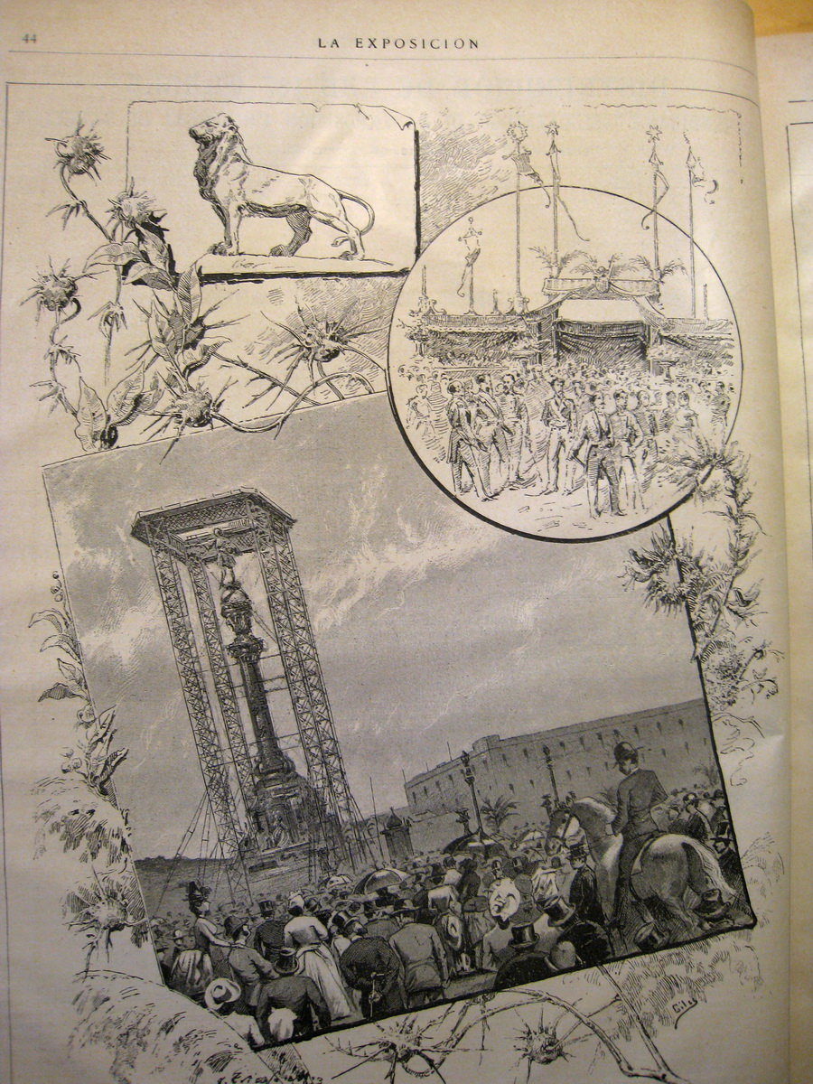 Noticia de la inauguració del monument a Colom. Barcelona de 1888